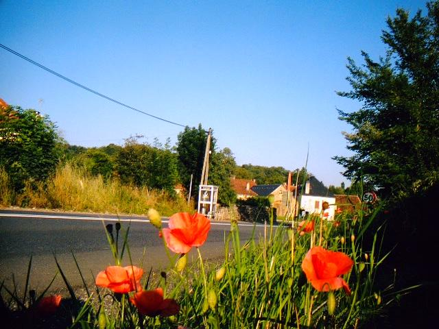 La N140 au Bourg